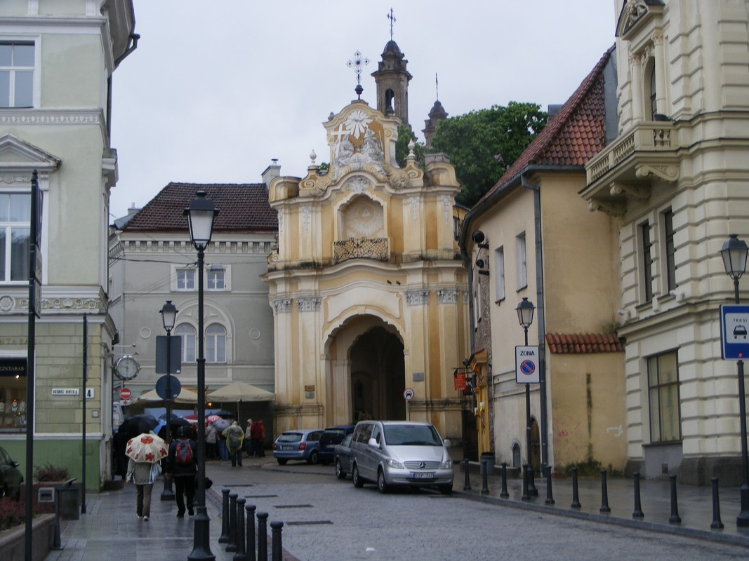 STARE MIASTO.